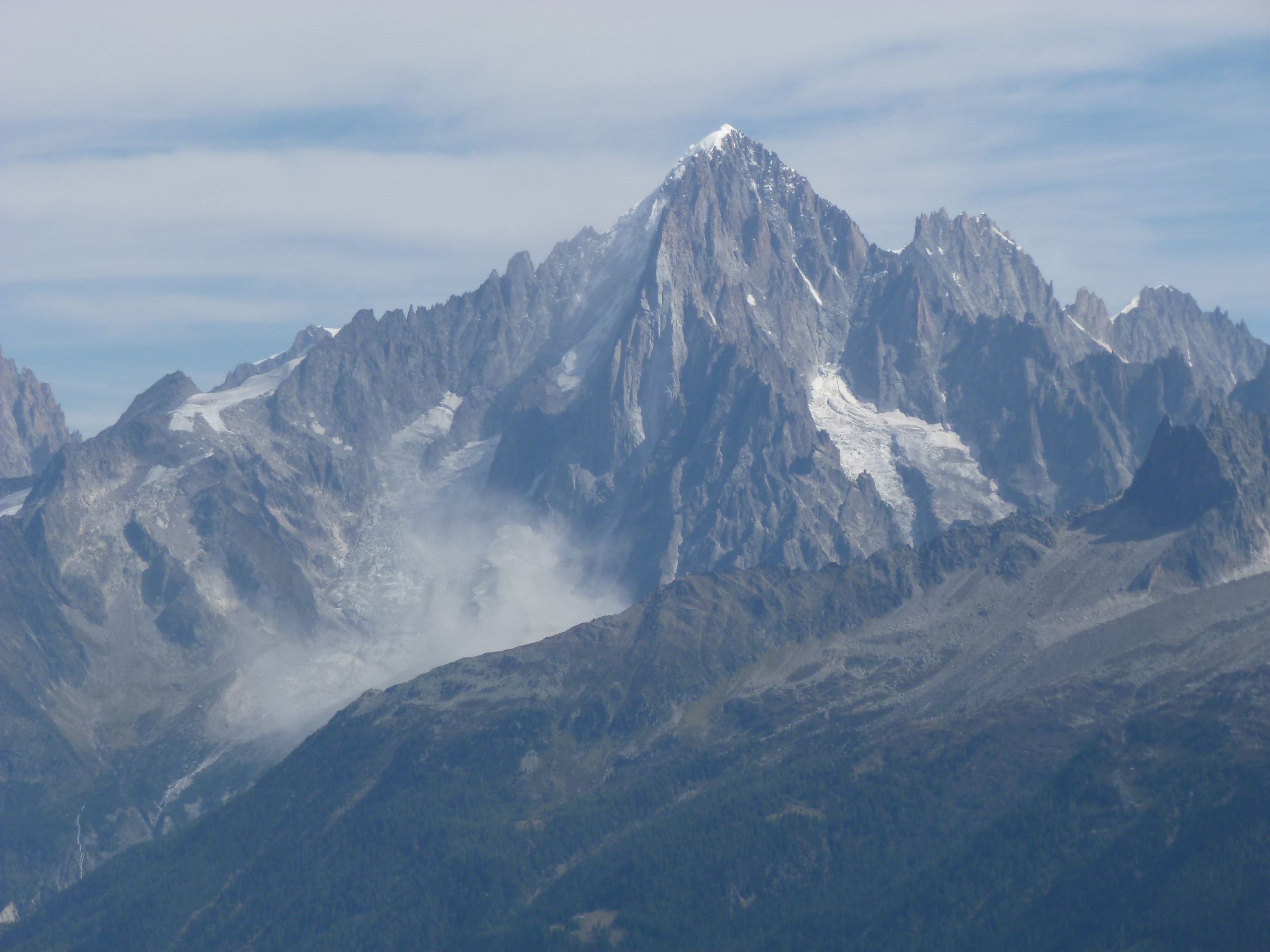 Les Drus, et le nuage de poussière provoqué par l'éboulement du 11 septembre 2011.